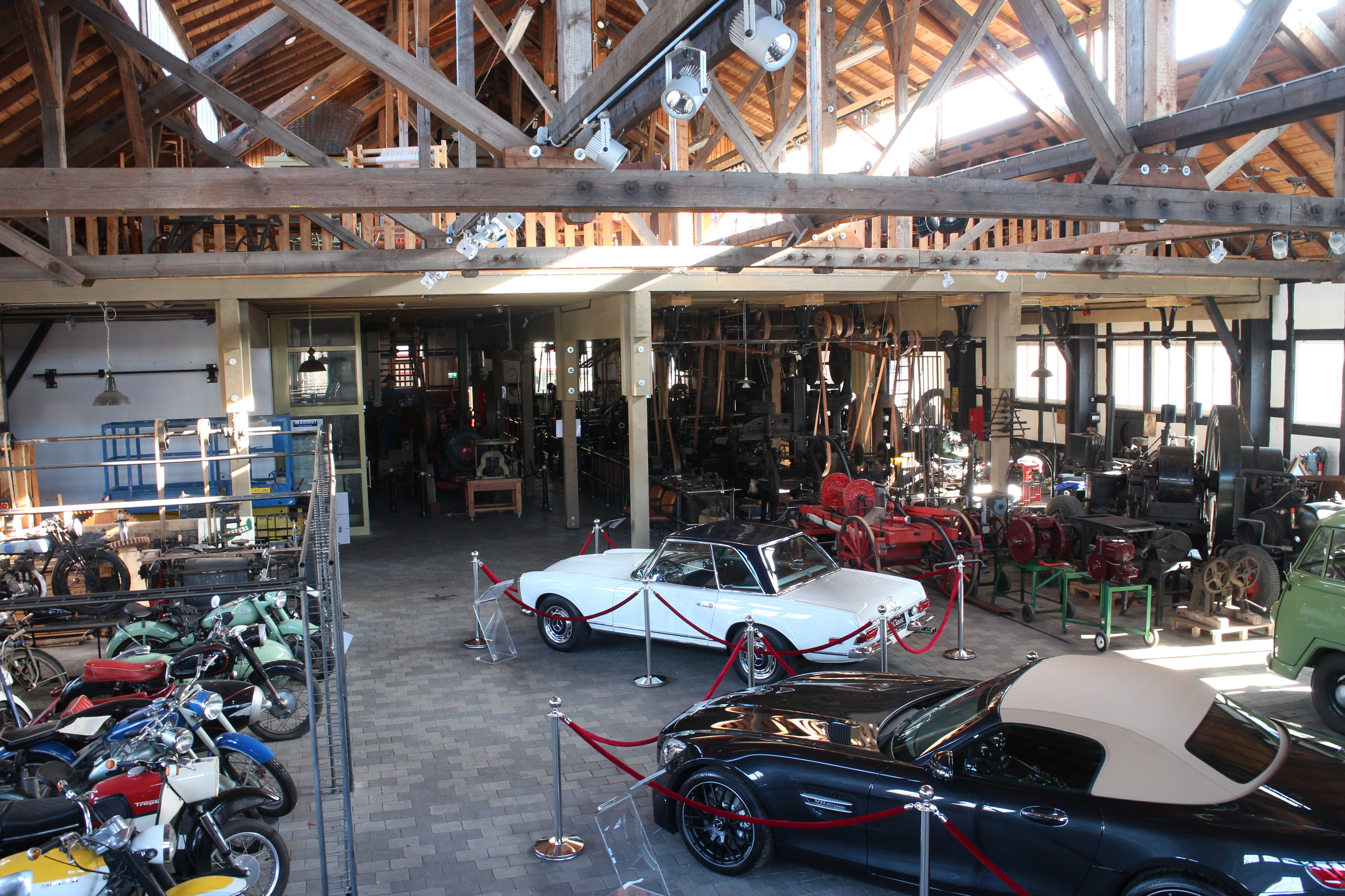 Fahrzeughalle im Technikmuseum Freudenberg